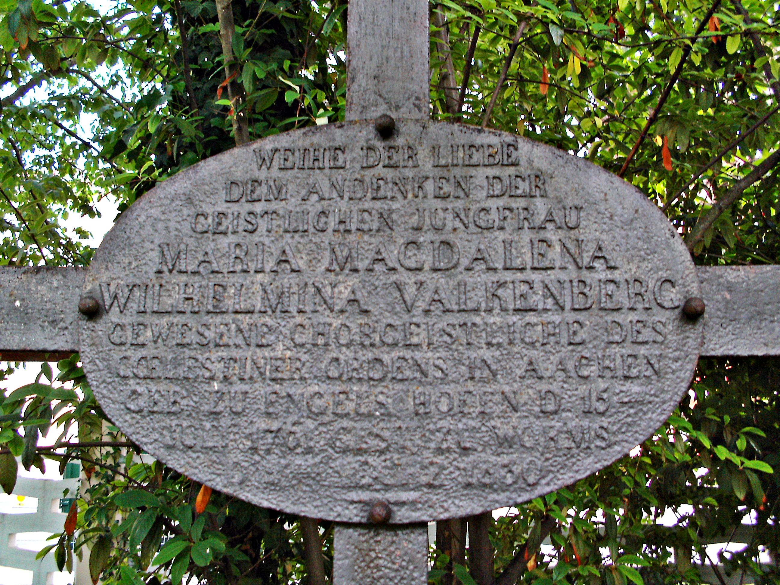 Maria Magdalena Wilhelmina Valckenberg (1761-1830) Cölestinerinnen-Nonne zu Aachen, Grabinschrift, Albert Schulte Park, Worms